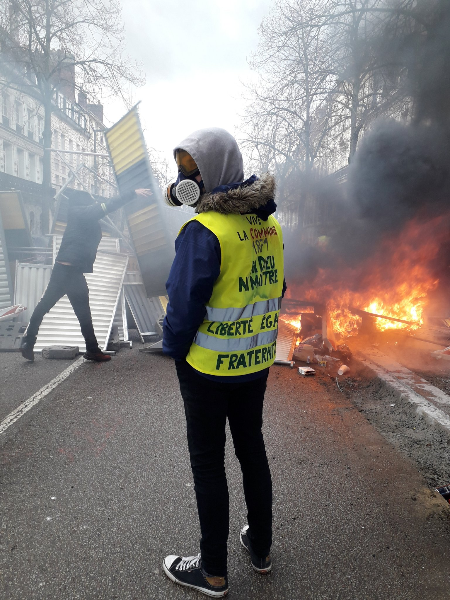 Un gilet jaune d'extrême-gauche devant une barricade lors de l'acte XII (2 février 2019), à Rouen près du Boulevard des Belges. Il porte un masque à gaz afin de se protéger des gaz lacrymogènes, régulièrement envoyés durant tout le mouvement des gilets jaunes. La manifestation est non-déclarée.